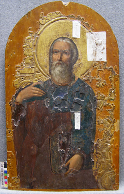 Икона святого апостола Иоанна Богослова из храма Рождества Христова в селе Уланок Суджанского района Курской области